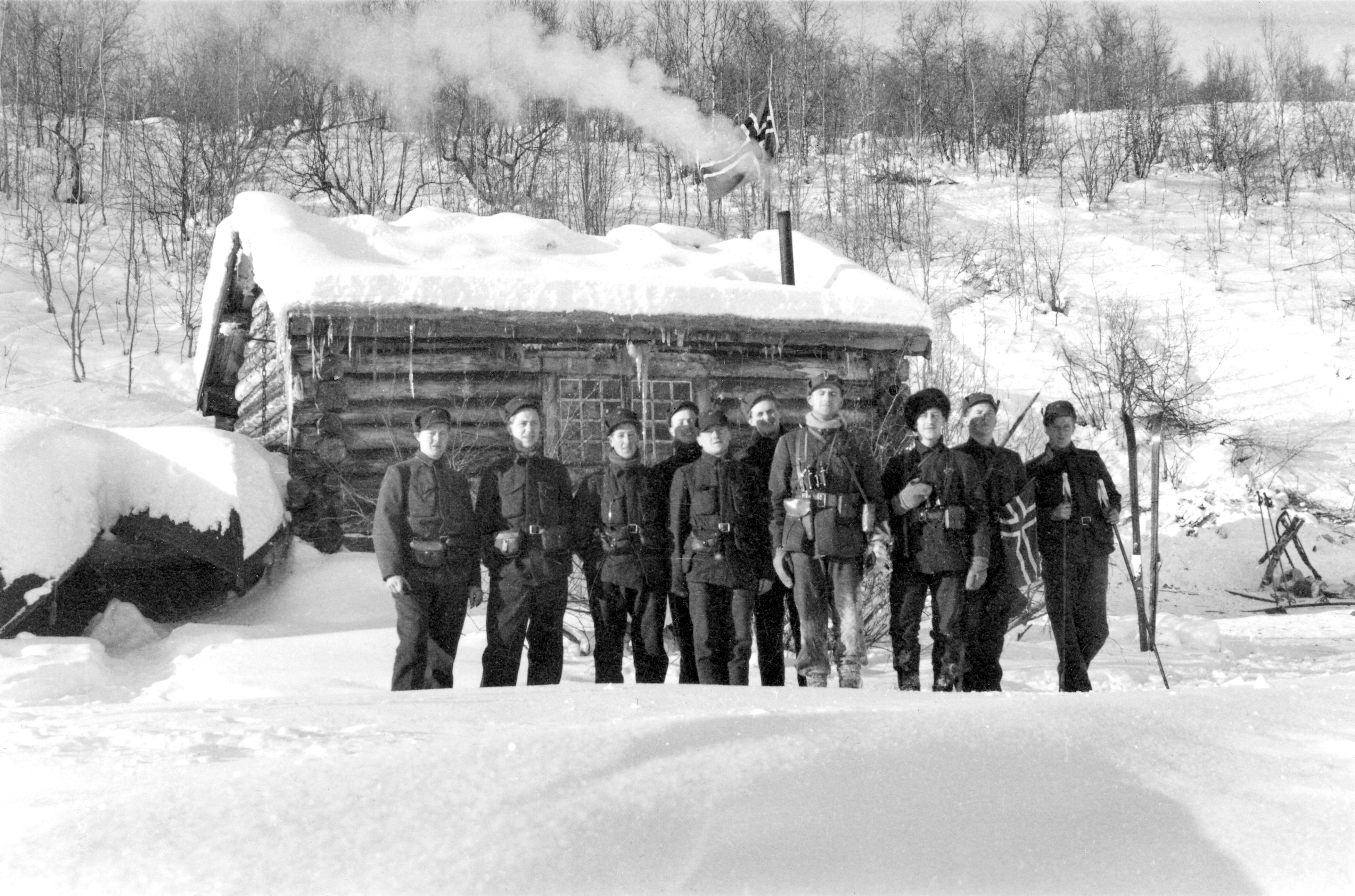 Format: Fotopositiv Dato / Date: 1940 Fotograf / Photographer: Kåre Hernes eller Trygve Gjervan Sted / Place: Skafferhullet, Finnmark Eier / Owner Institution: Trondheim byarkiv, The Municipal Archives of Trondheim Arkivreferanse / Archive reference: Tor.H42.B53.F3887 Fra Trygve B. Gjervans (1918 - 2004) samling. Gjervan var vernepliktig og tjenestegjorde ved Infanteriregiment 12 som holdt nøytralitetsvakt ved grensen til Sovjetunionen og Finland i Finnmark i 1940. Da tyskerne invaderte Norge 9. april ble IR 12 sendt sørover, og under general Carl Gustav Fleischer (1883 - 1942) ble de satt inn i det norske motangrepet ved Gratangen nær Narvik, hvor IR 12 led store tap. Fotograf er ifølge Gjervans notater hovedsakelig Kåre Hernes. Trygve Gjervans egen tekst til bildet: Fra utposten "Skafferhullet" like ved grensen. Den samlede styrke.